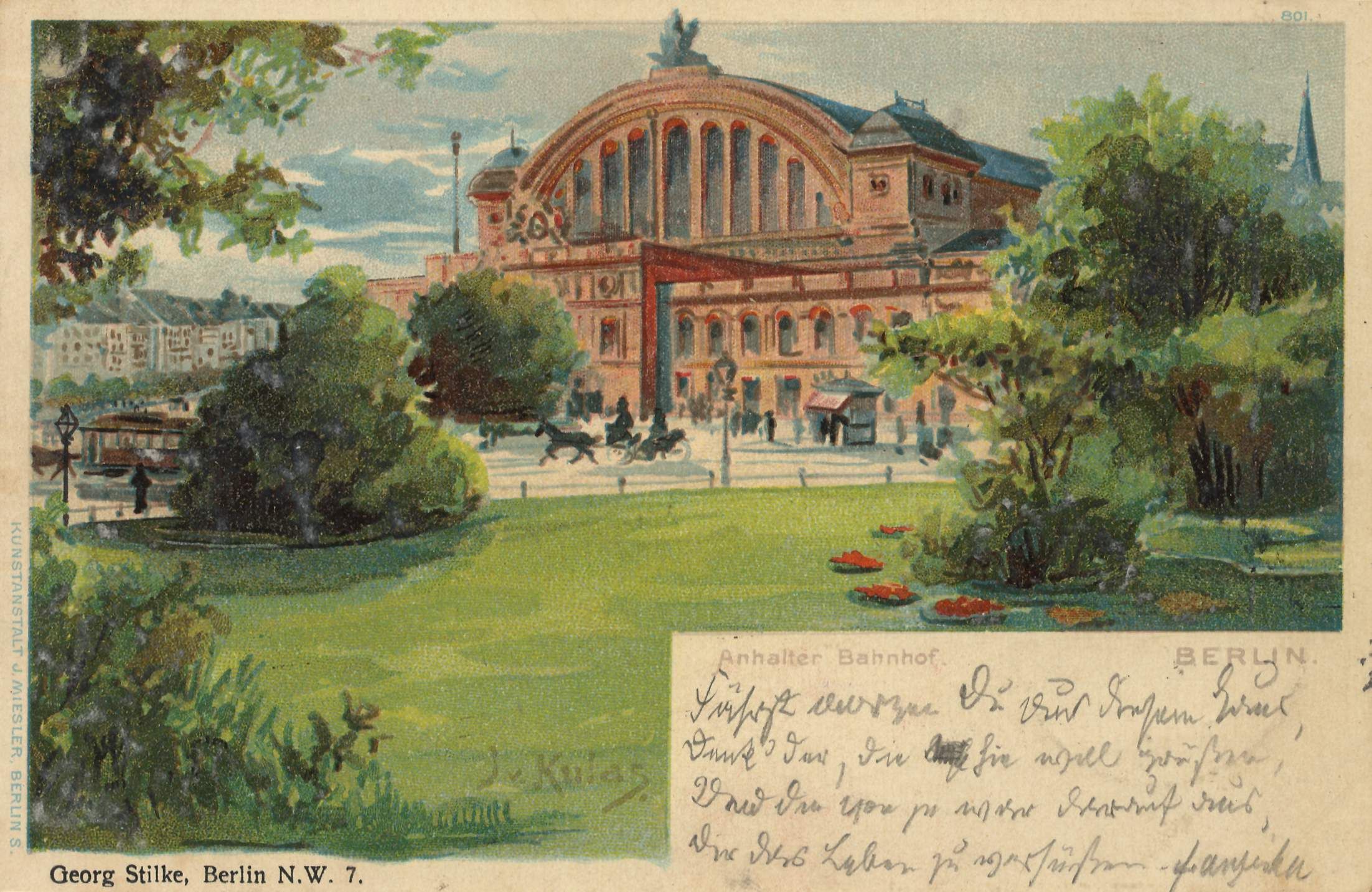 Anhalter Bahnhof in Berlin-Kreuzberg